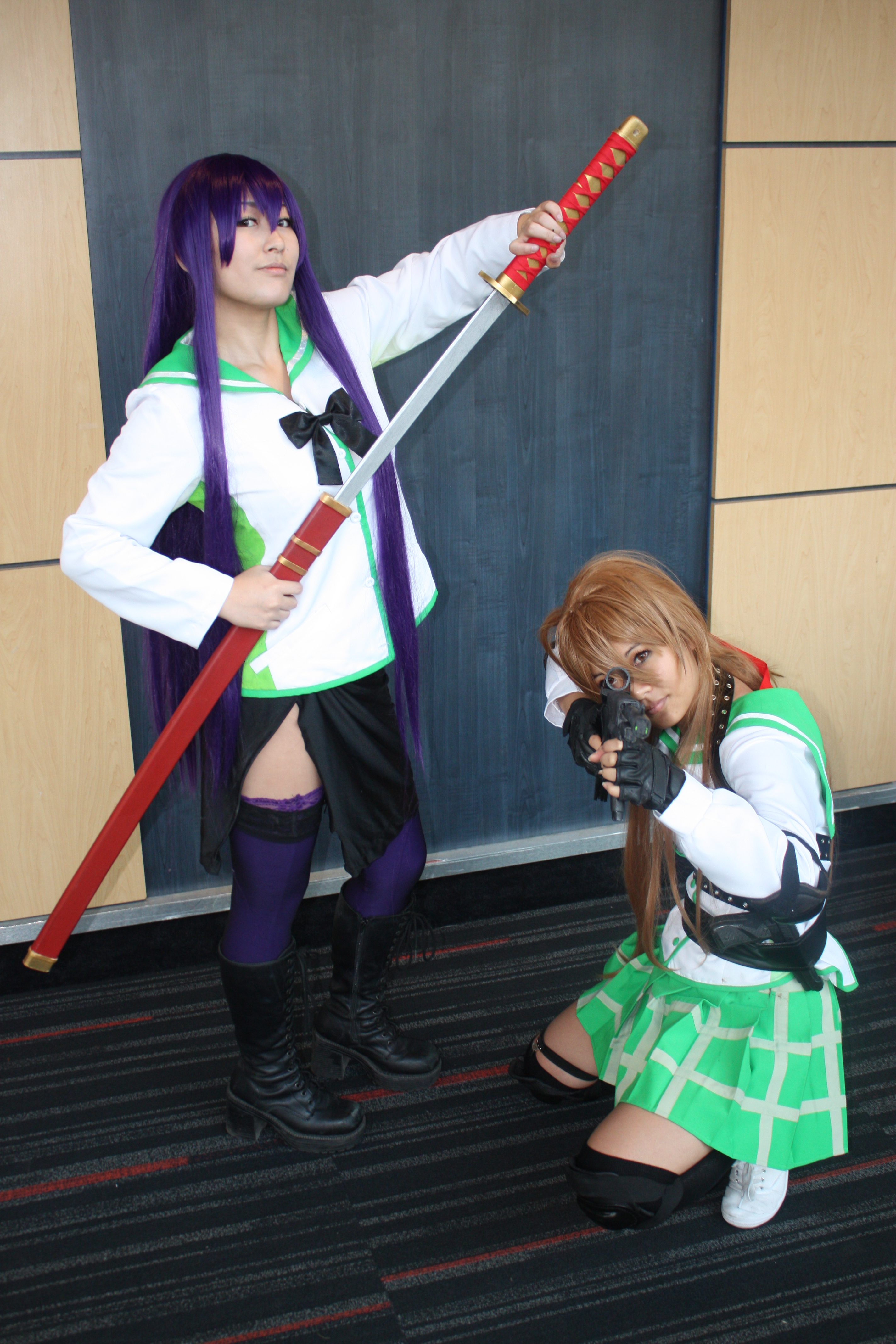 Otakuthon 2014: Saeko Busujima and Rei Miyamoto